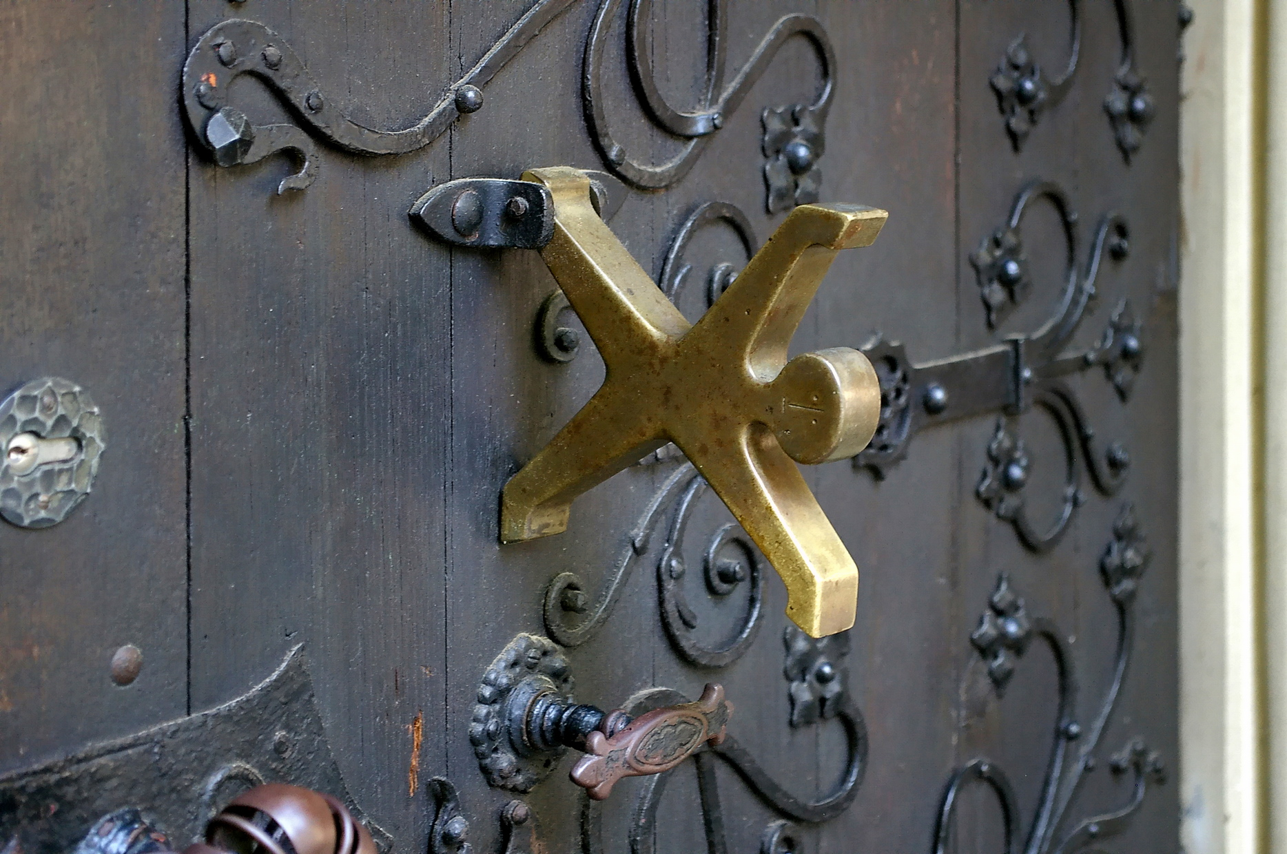 Radschläger aus Bronze als Türklopfer an Nebenpforte von Stankt Lambertus in Düsseldorf